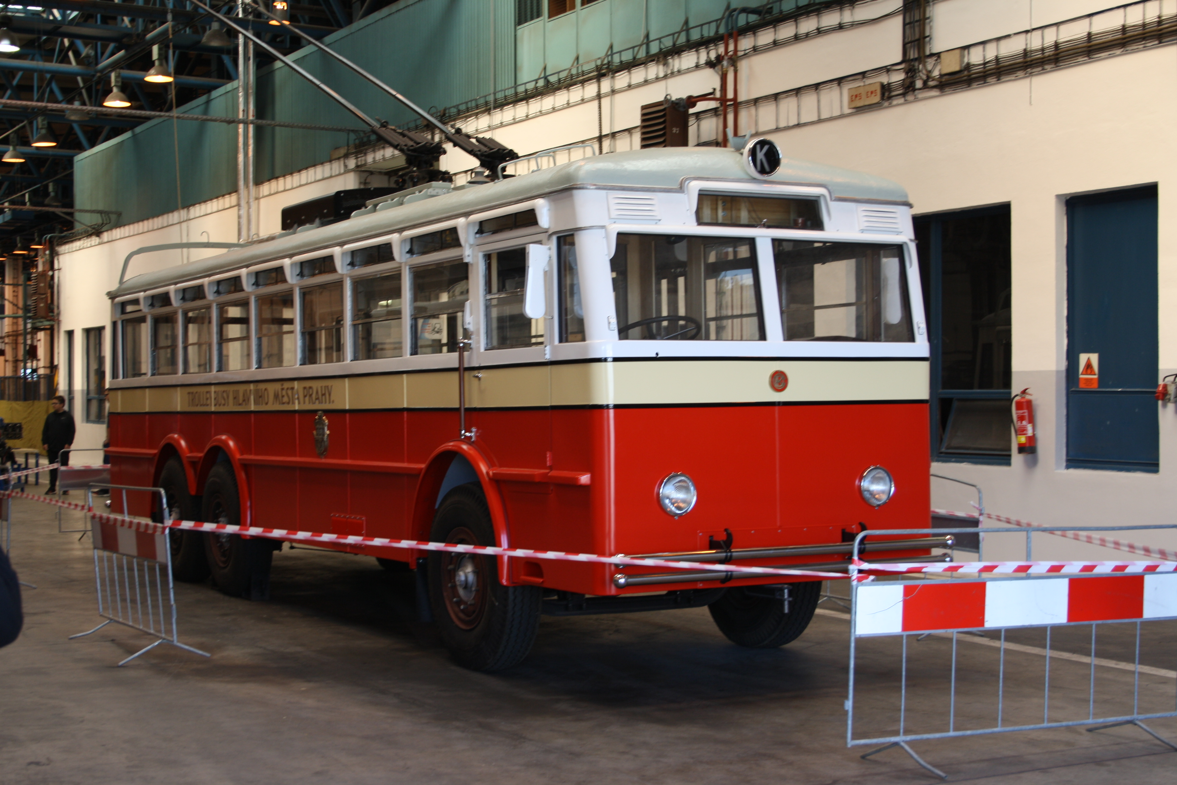 Stav rekonstruovaného trolejbusu Praga TOT v září 2019; pohled na pravou stranu zepředu